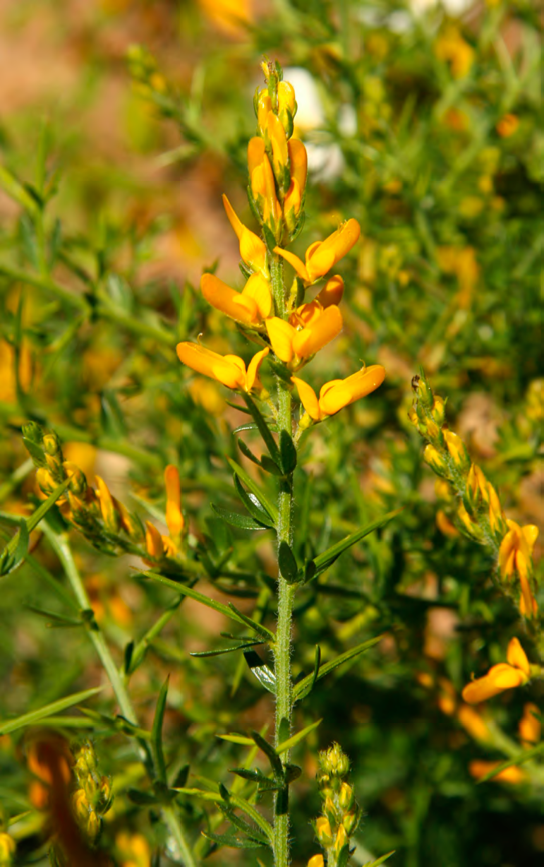 Iconografia scientifica